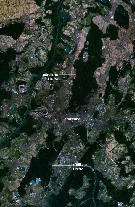 selbst erstellt mit NASA World Wind.